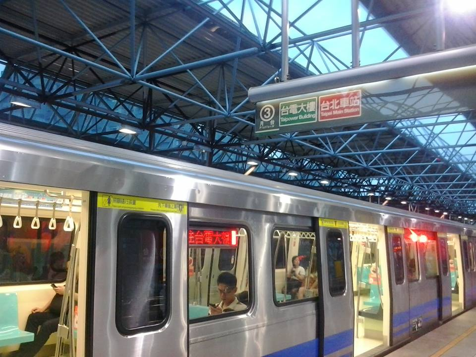 中文（台灣）: 台北捷運信義線通車前，北投站第3月台標示新店線終點站為台電大樓站